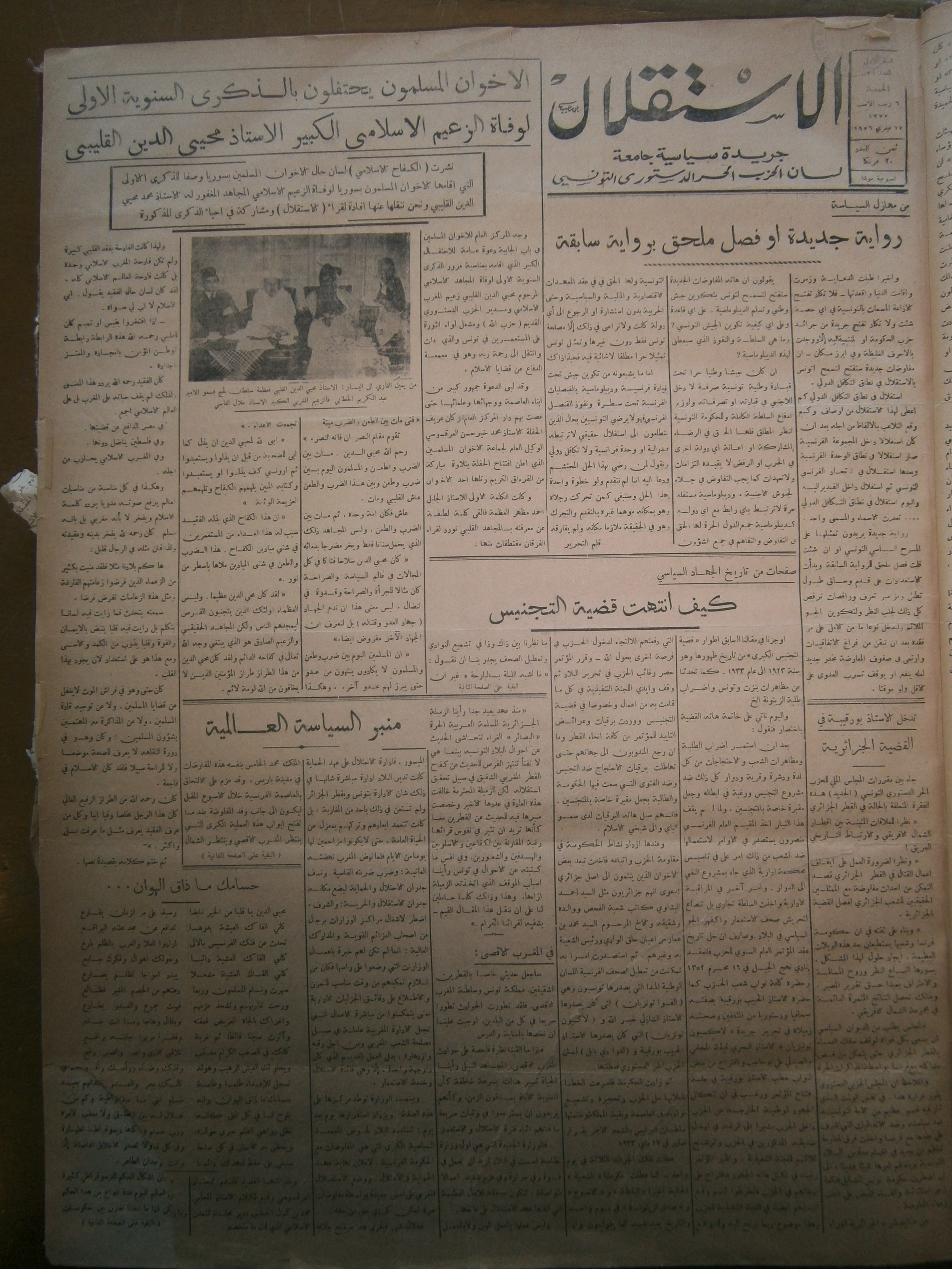 صورة من جريدة الاستقلال الصادرة بين 1955 و1960